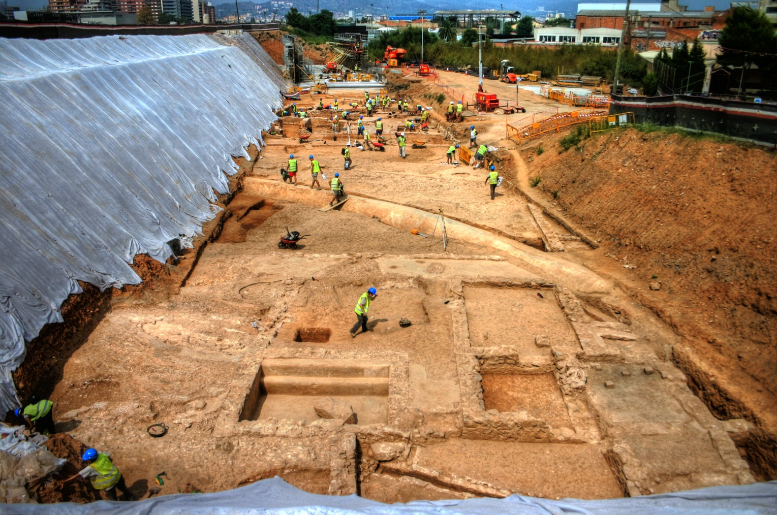 Vista general de la primera fase d'excavacions de la vila romana del Pont del Treball. 2012. Foto: Daniel Alcubierre